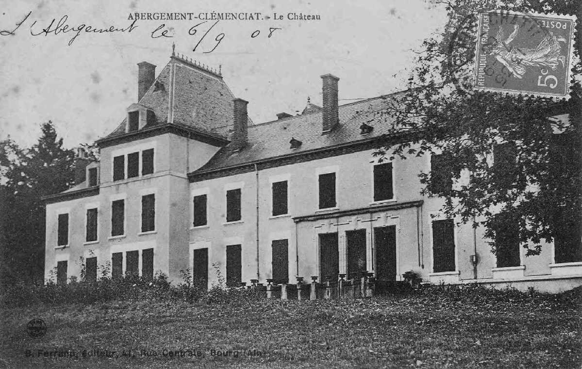 Carte postale ancienne du château de L'Abergement-Clémenciat, Ain, France.